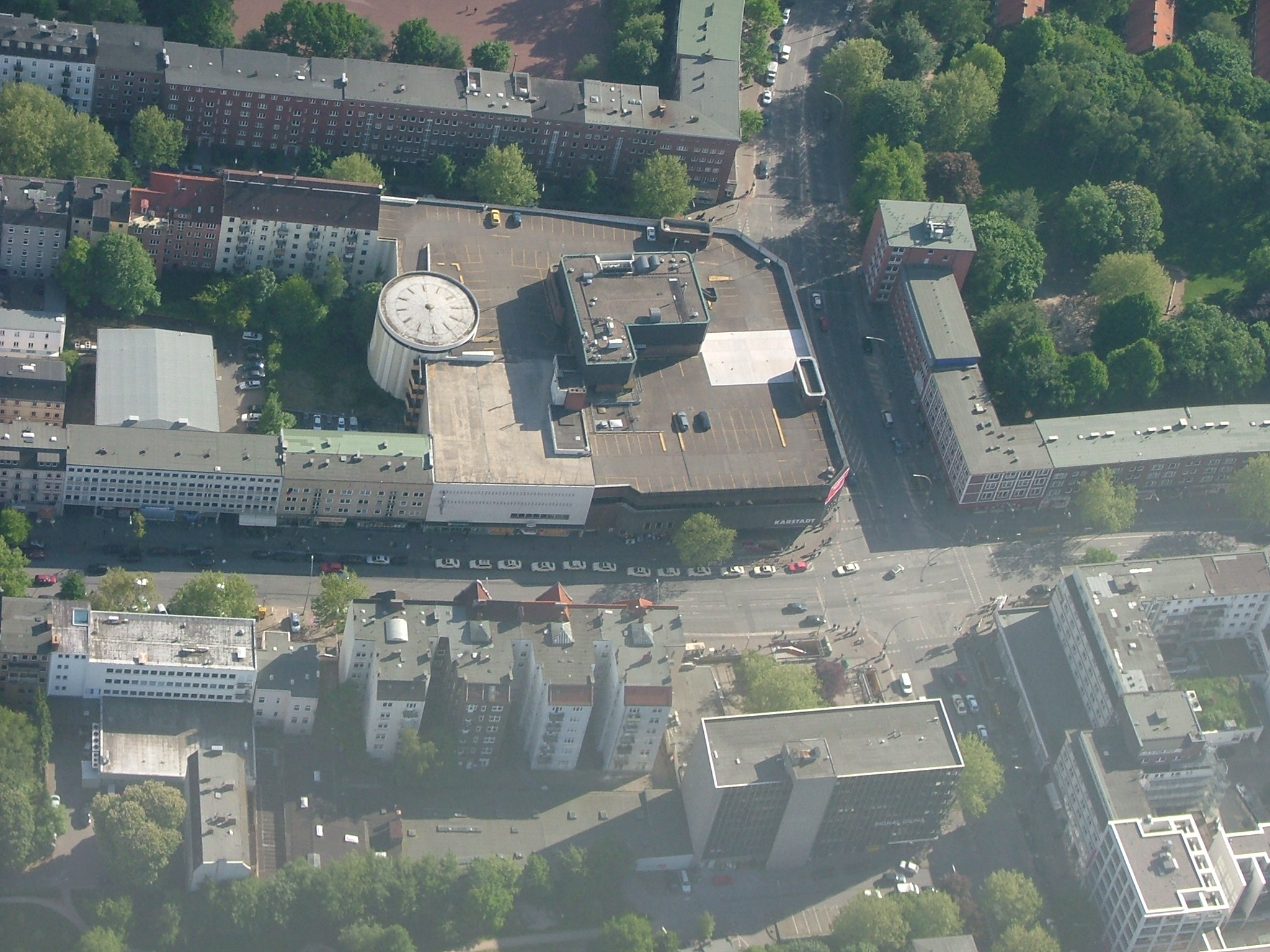 Bildbeschreibung: Die Kreuzung Osterstrasse (links nach rechts), Heussweg (oben nach unten) in Eimsbüttel. Von Nord-Ost fotografiert Fotograf: Merlin Senger Datum: mai 2004